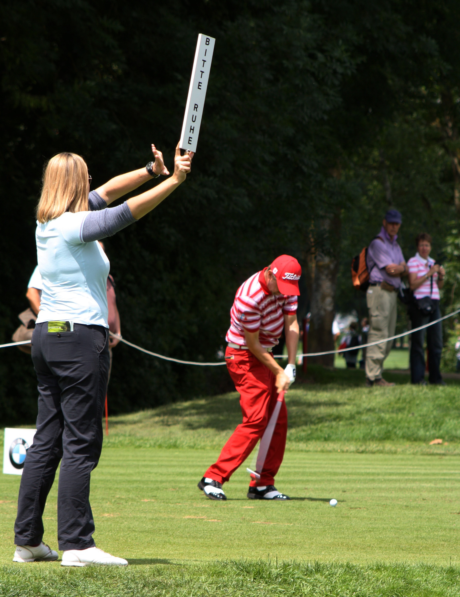 23. BMW International Open bei Muenchen Frau mit "Bitte Ruhe" Schild Golfer Liam Bond